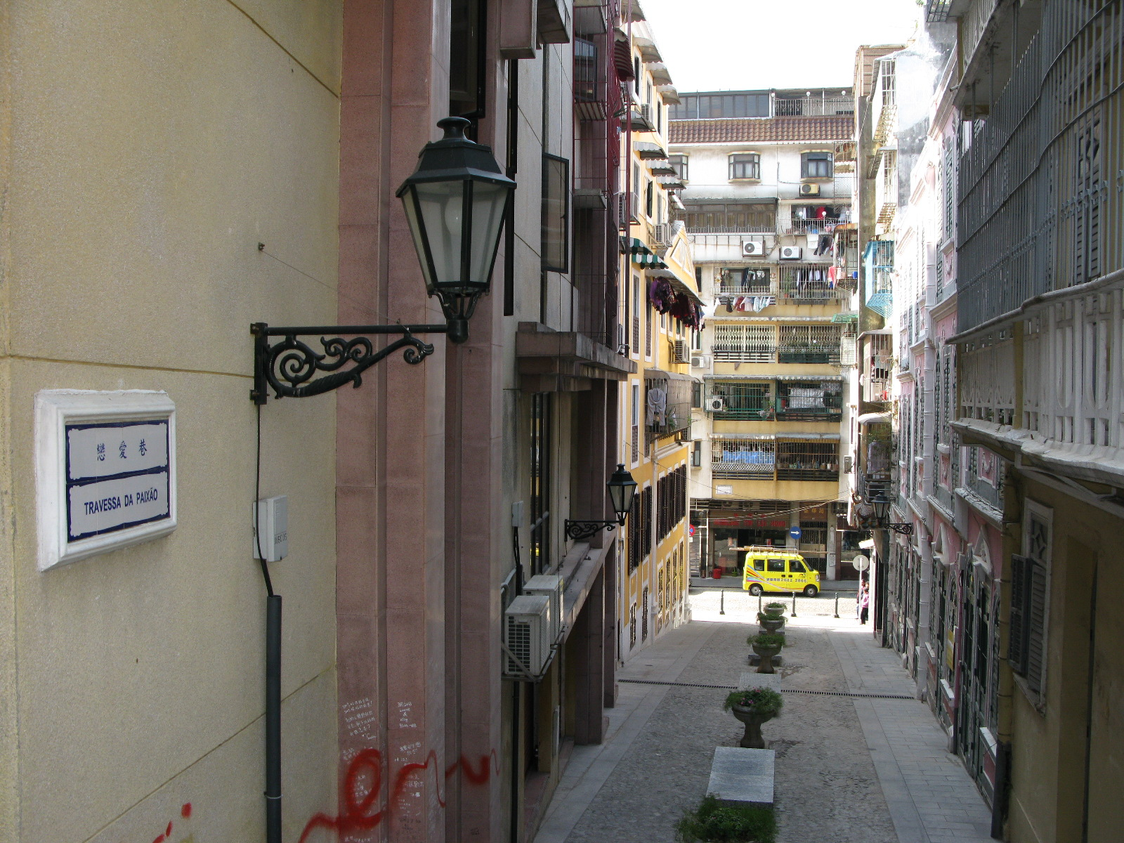 澳門戀愛巷。